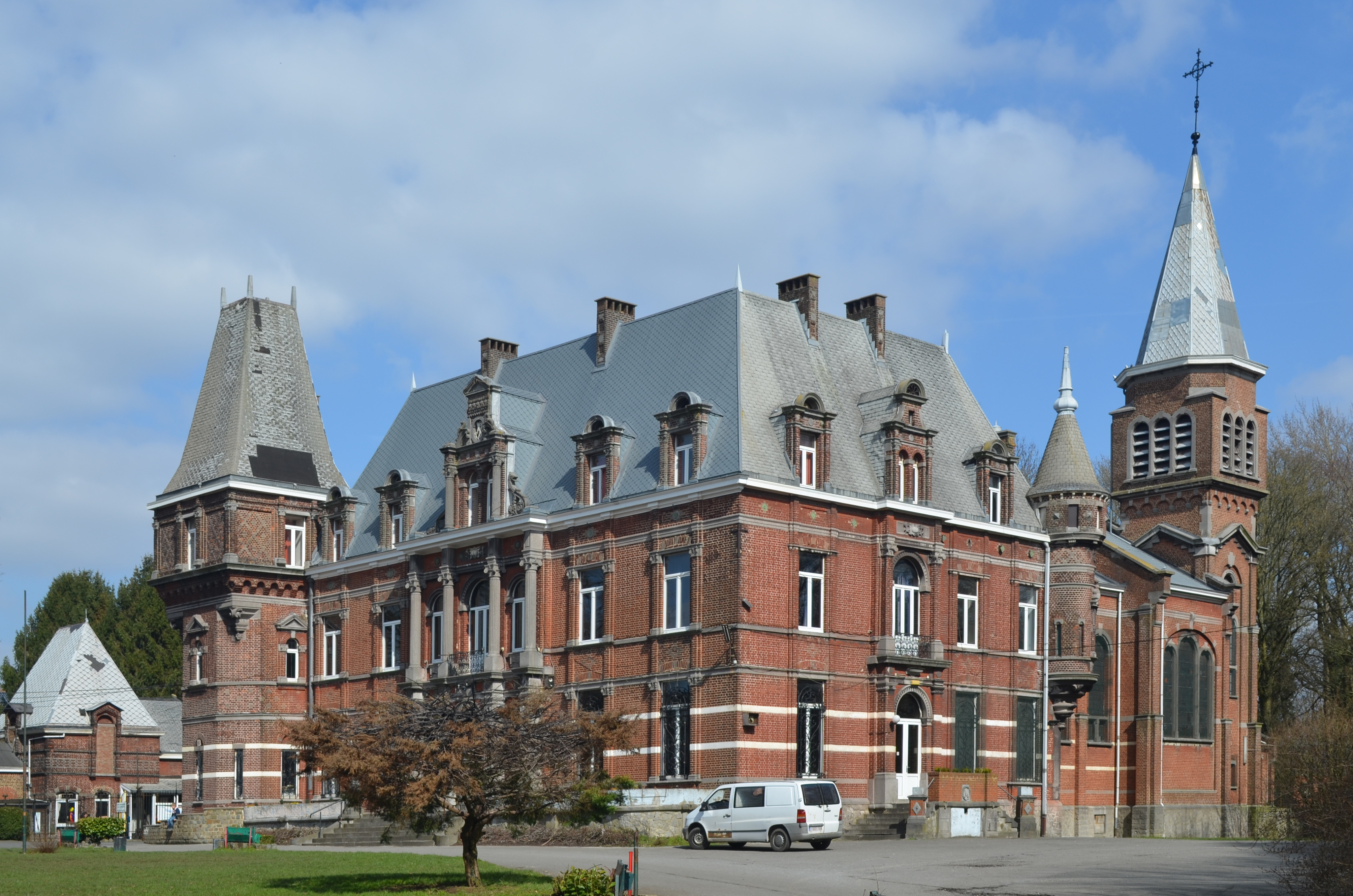 Jumet (Charleroi-Belgique) - Château Mondron et église Saint-Lambert.